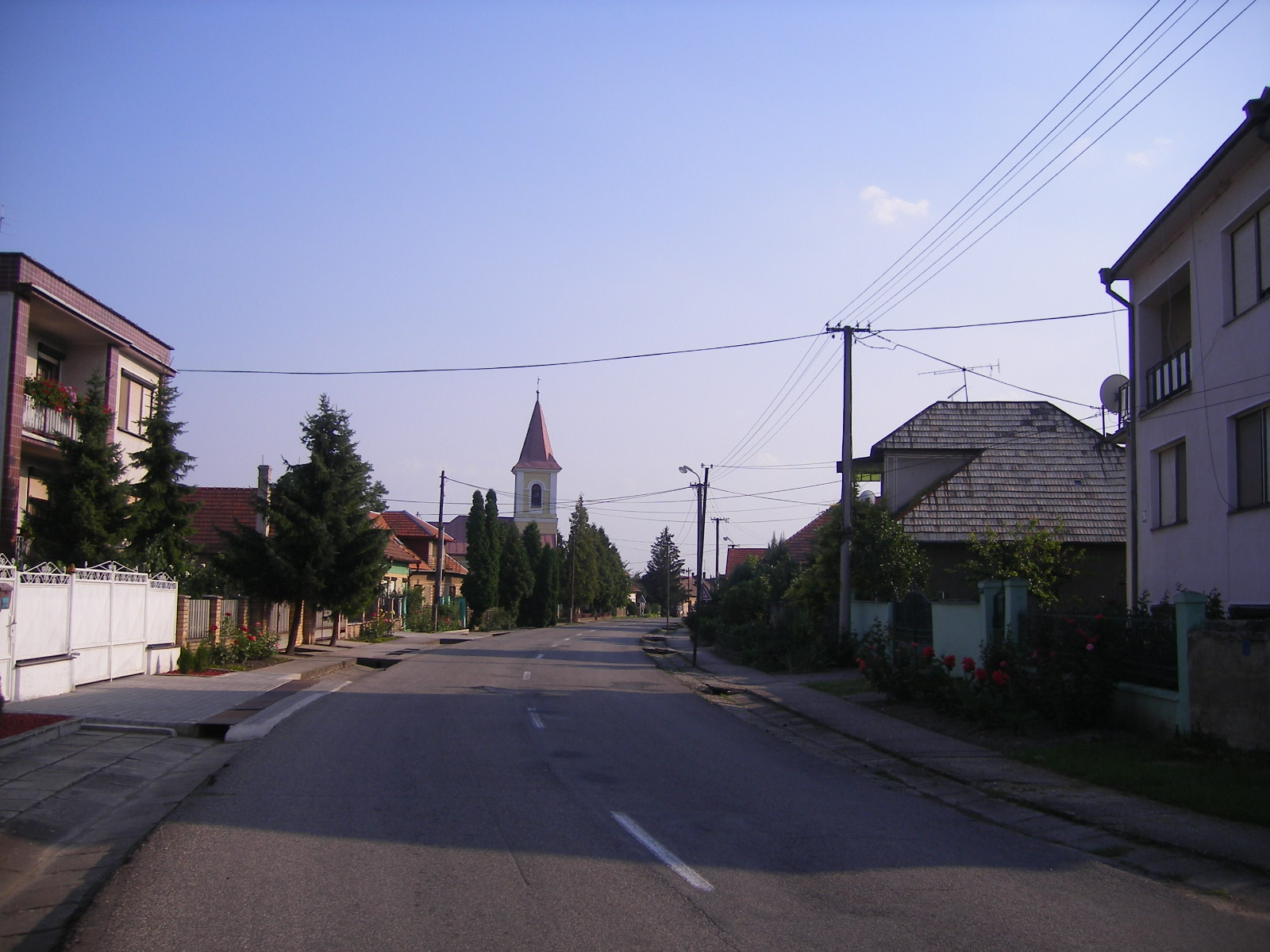 Ipolybél - utcakép